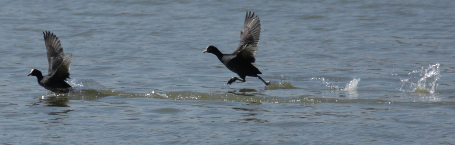 Folaghe